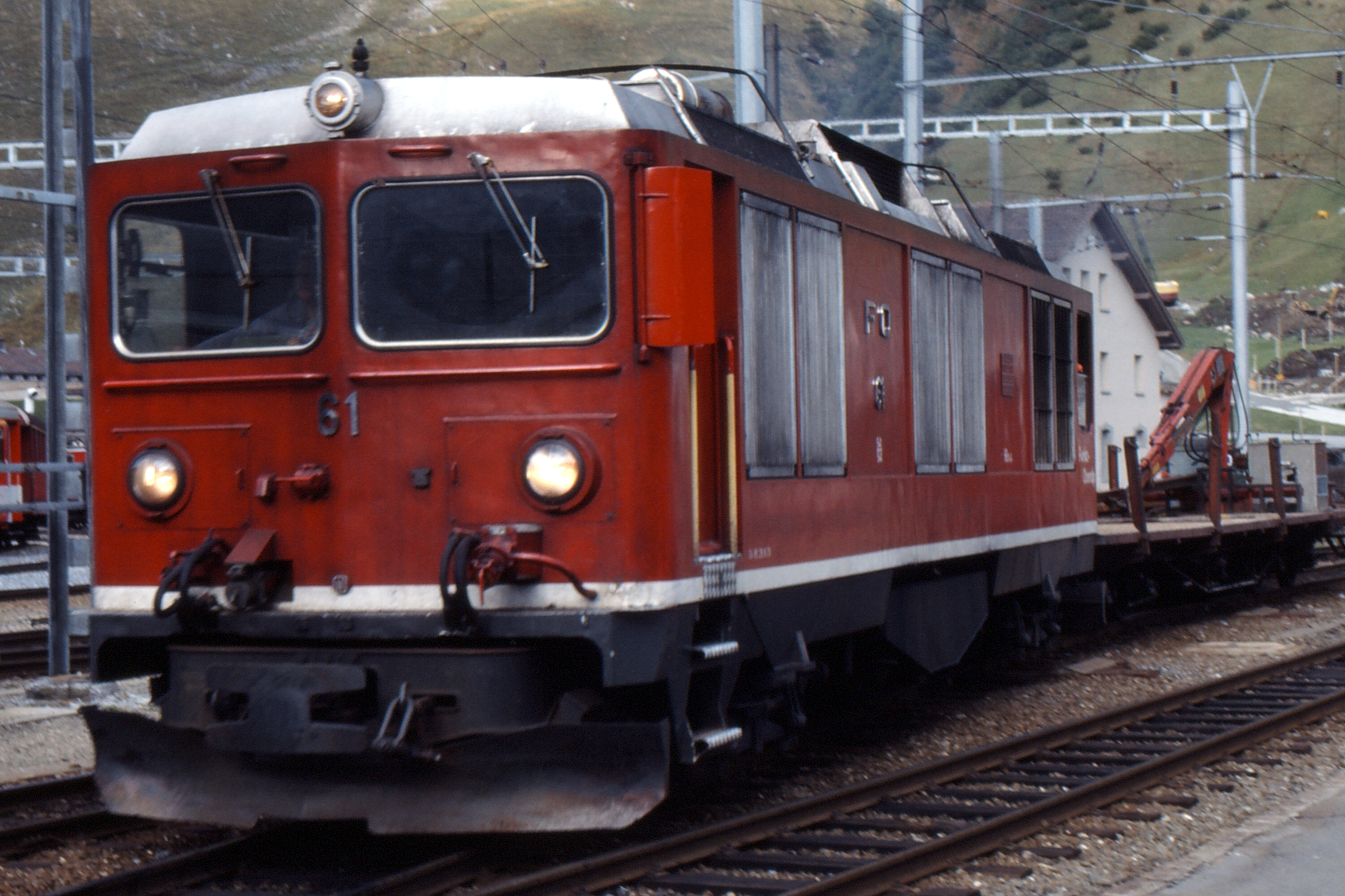 HGm 4/4 61 at Andermatt Switzerland